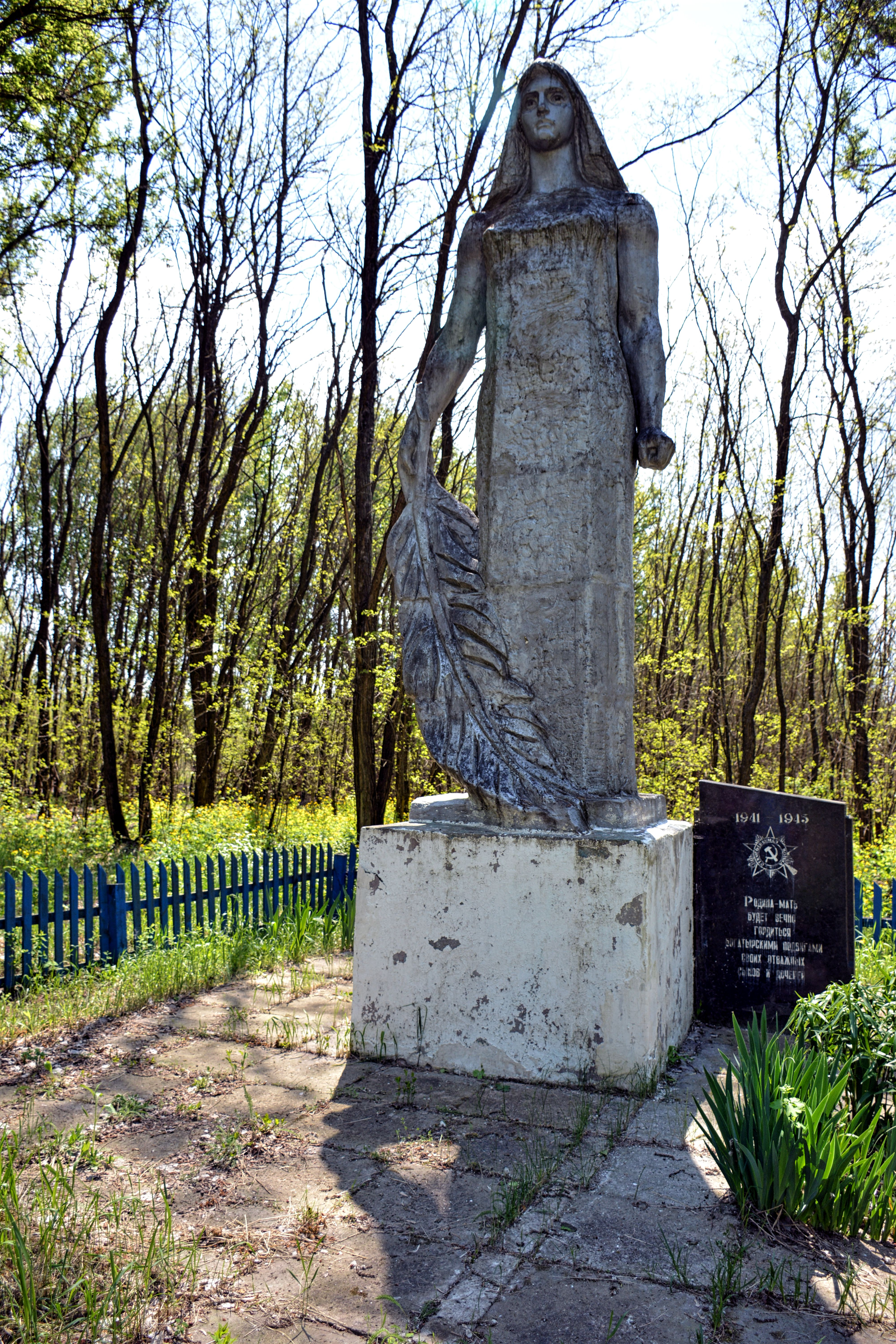 фото_5